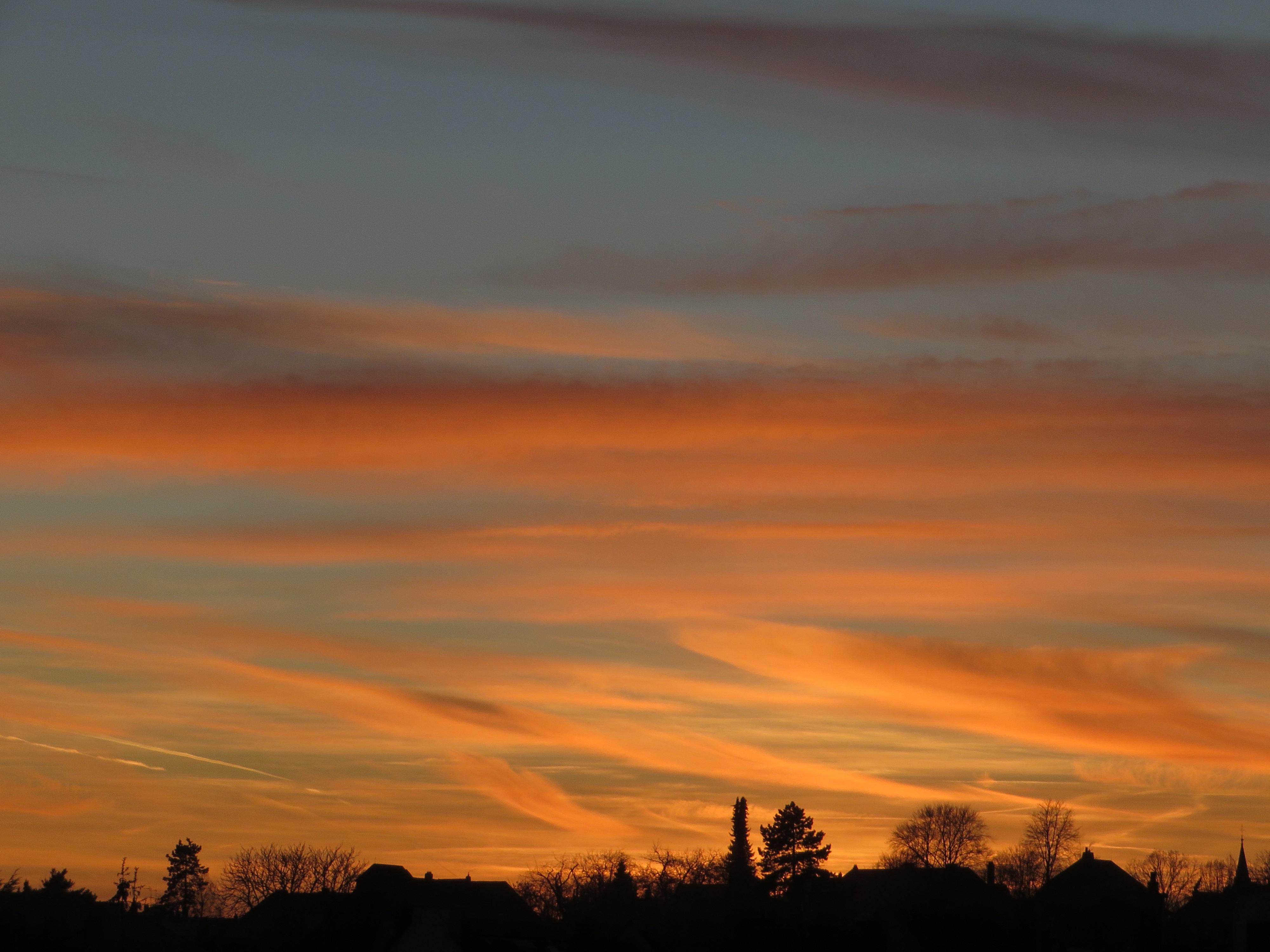 Abendrot an Cirrus in Limburg am 14.01.2019